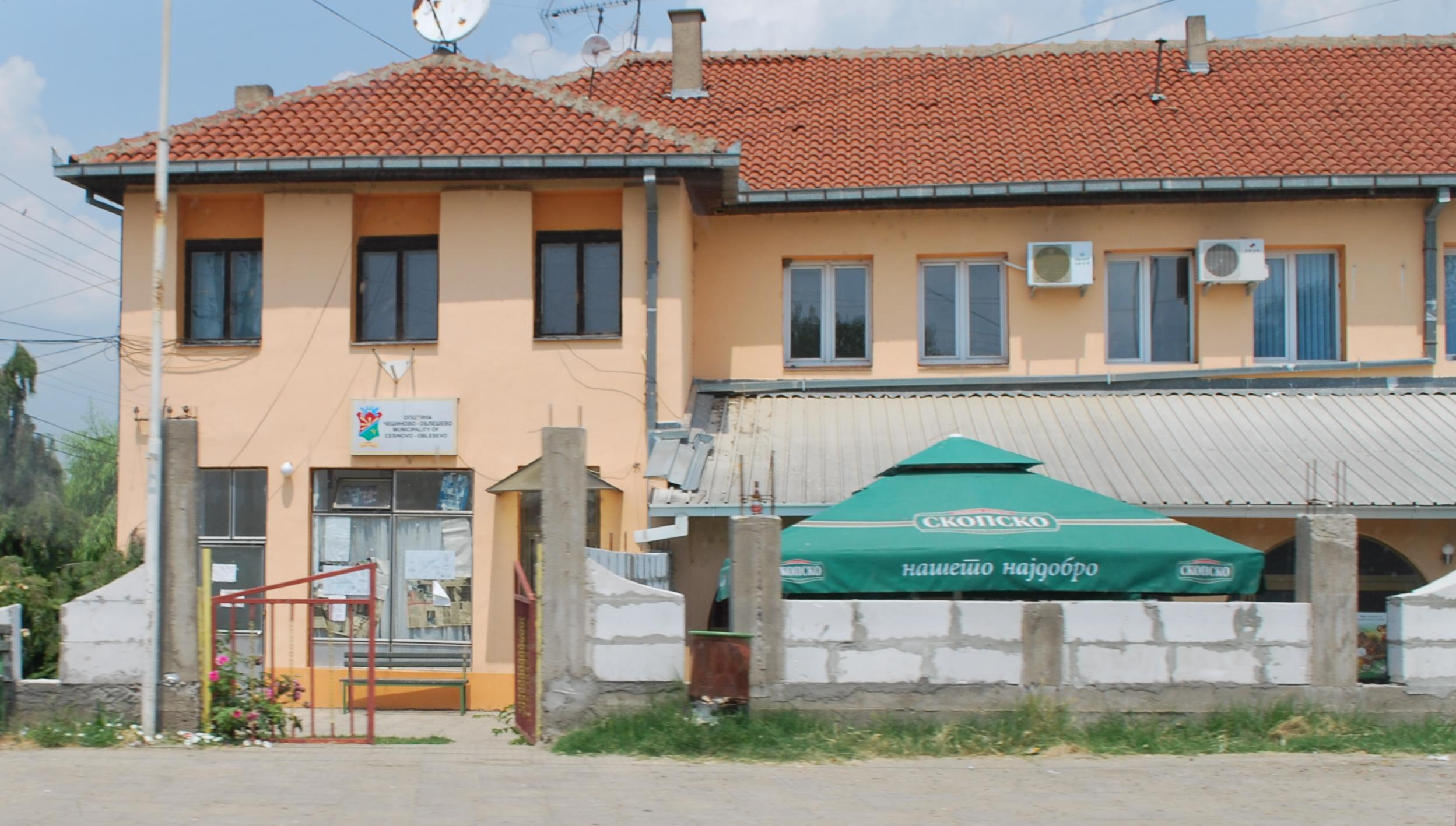 Toen hall od Češinovo-Obleševo Municipality in Obleševo